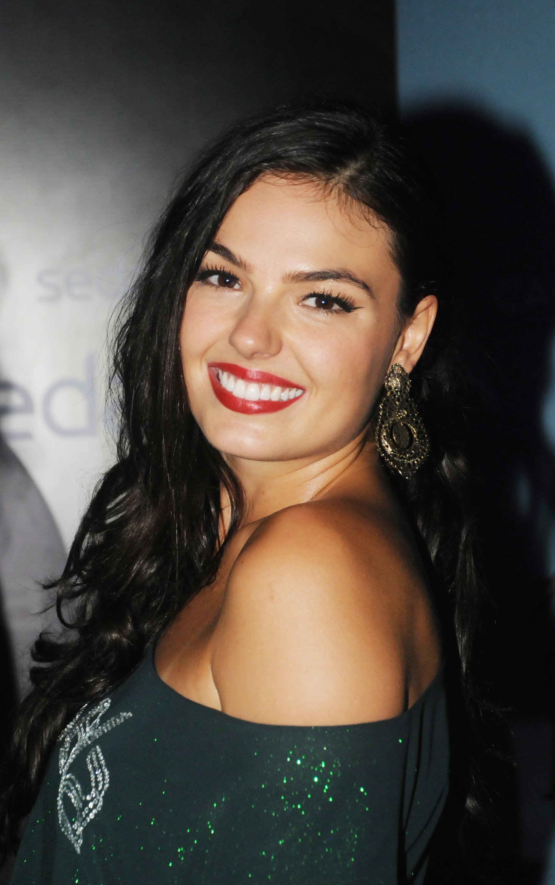 A atriz Ísis Valverde